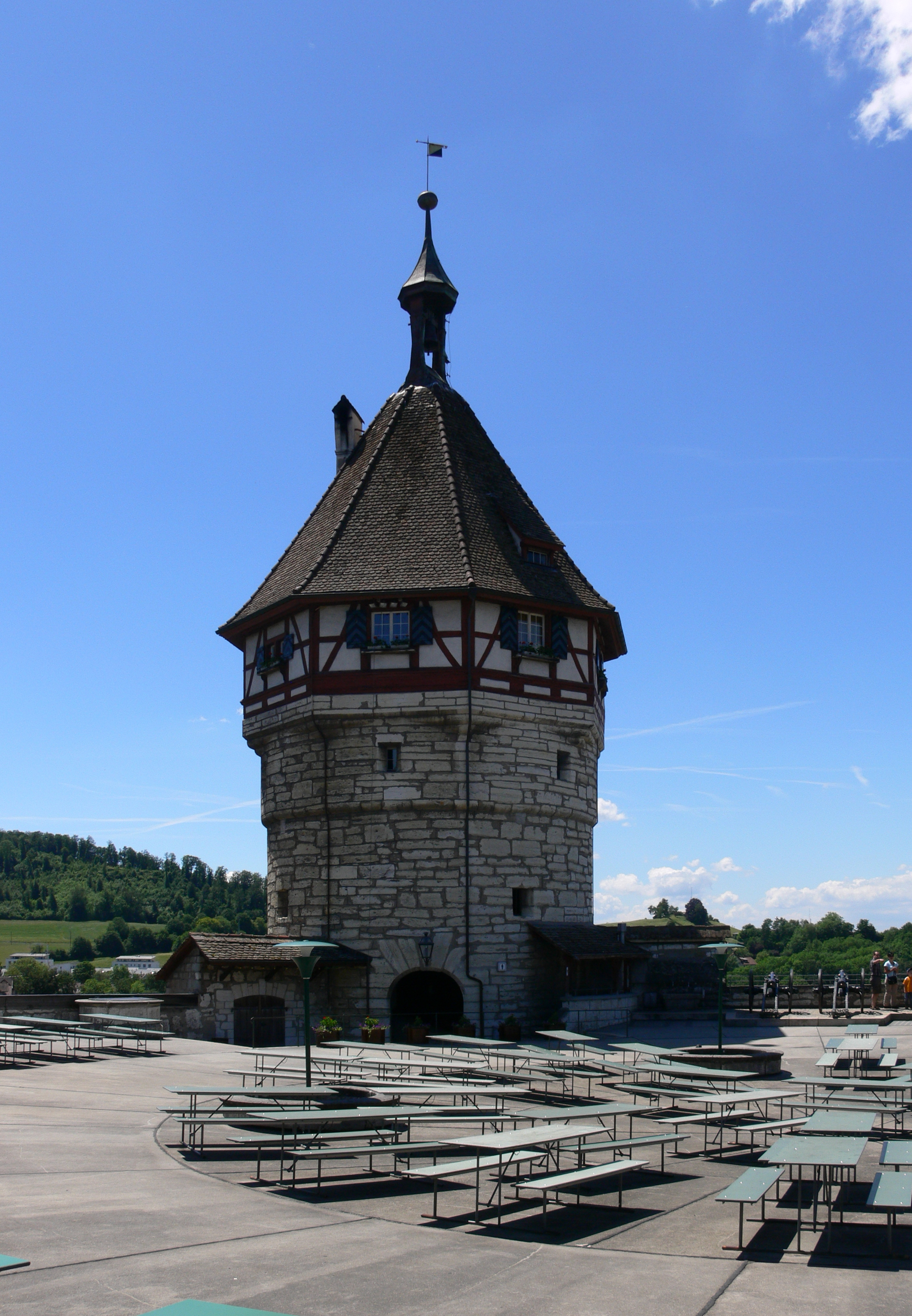 Schaffhausen, Munot , Geschützplattform mit Turm